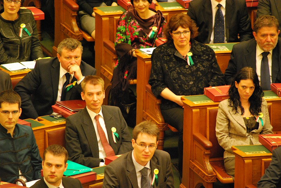 Az LMP képviselői az országgyűlés plenáris ülésén